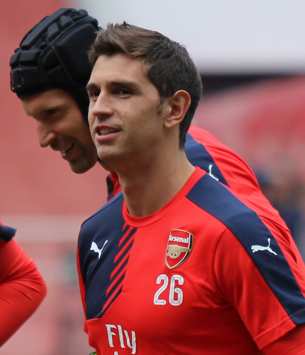 Damian Martinez during 2015 Arsenal Members Day